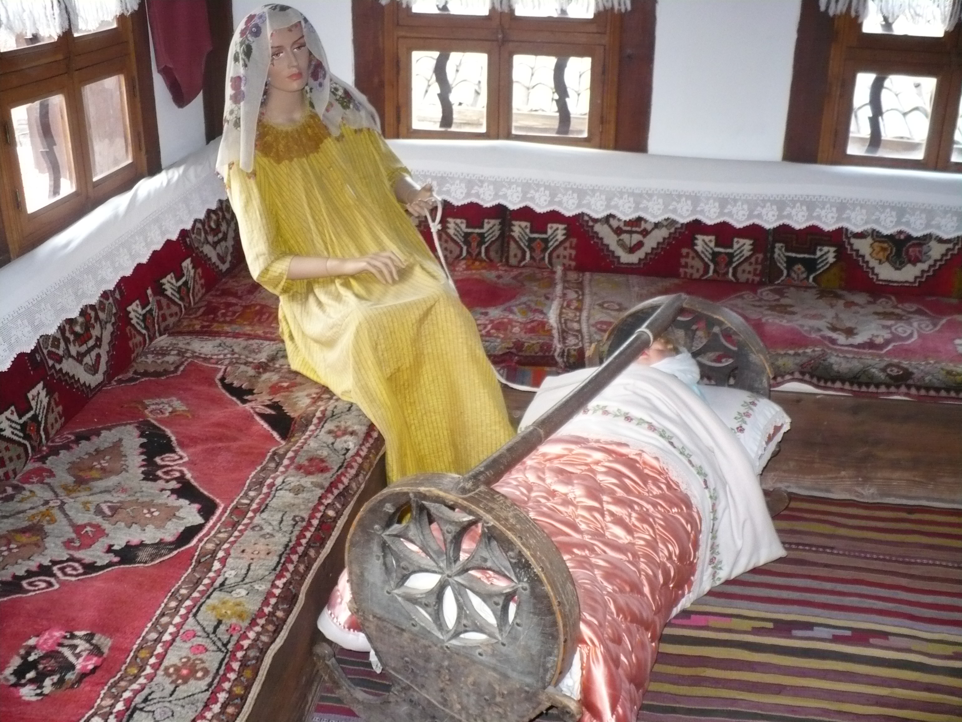 Safranbolu Kent Tarihi Müzesi